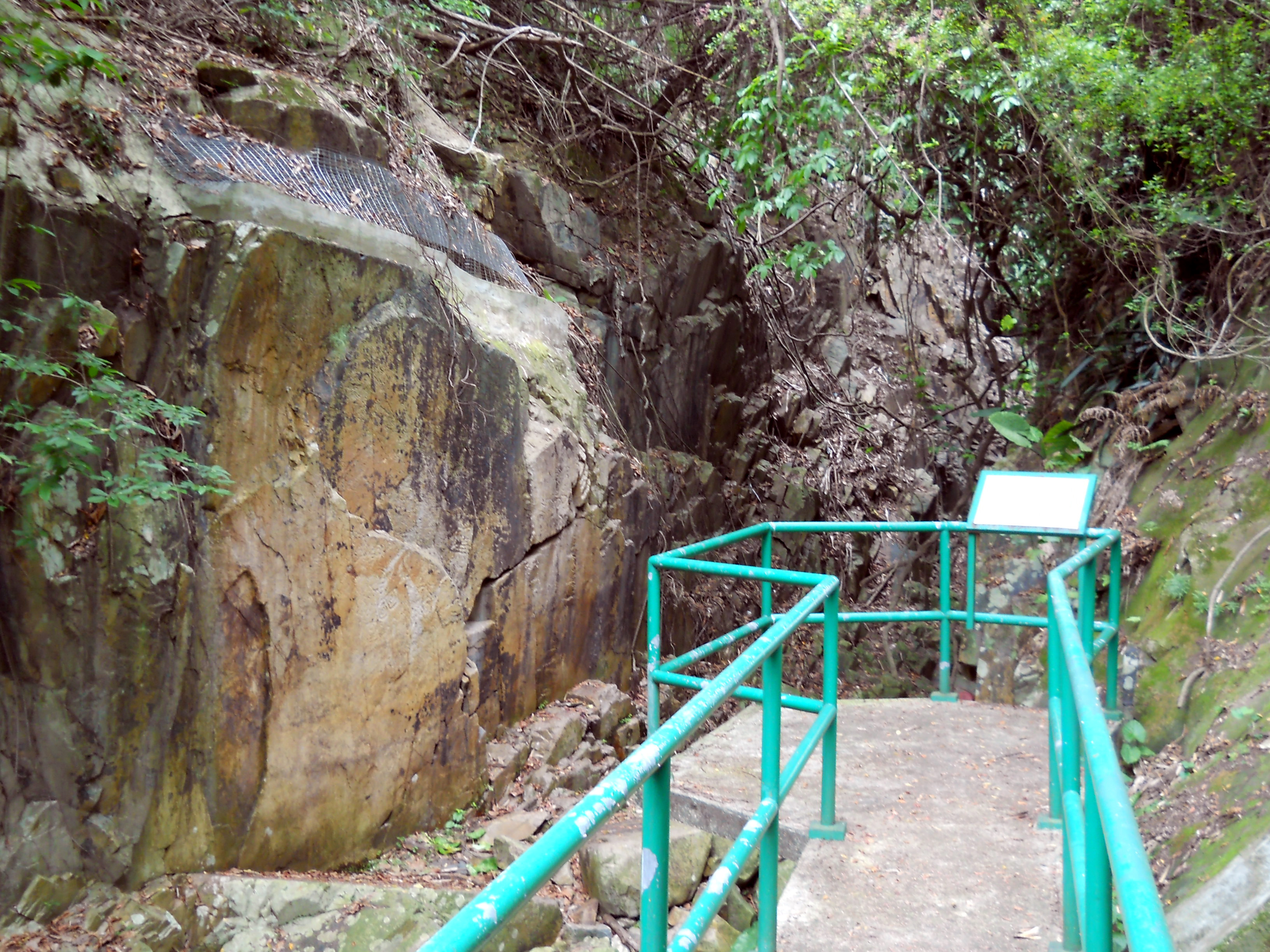 中文（香港）: 黃竹坑石刻